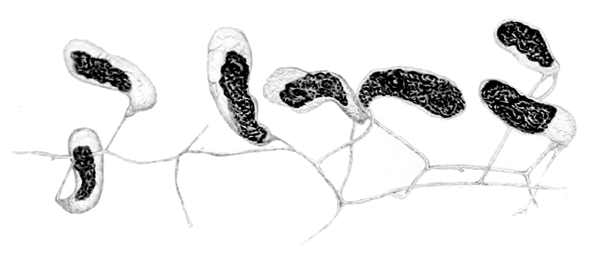 Kette von 7 Blasen mit Rhizoiden (Haupt- und Nebenrhizoiden) von Geosiphon. Im Innern der Blasen die Nostoc-Coenobien. In durchfallendem Lichte gezeichnet. Verg. ca. 100 mal.